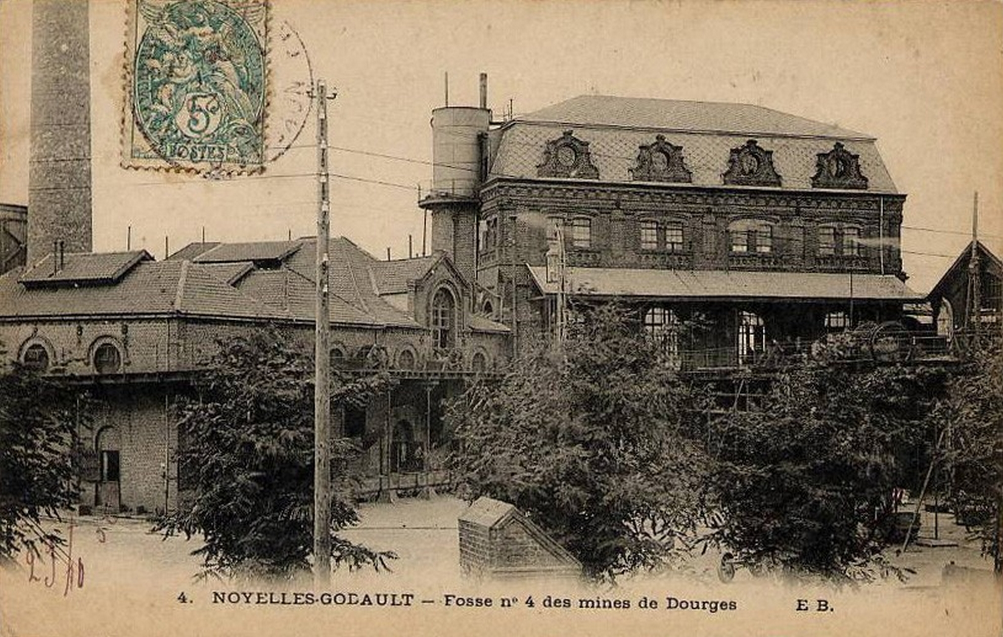 La fosse n° 4 - 4 bis de la Compagnie des mines de Dourges était un charbonnage constitué de deux puits situé à Noyelles-Godault, Pas-de-Calais, Nord-Pas-de-Calais, France.